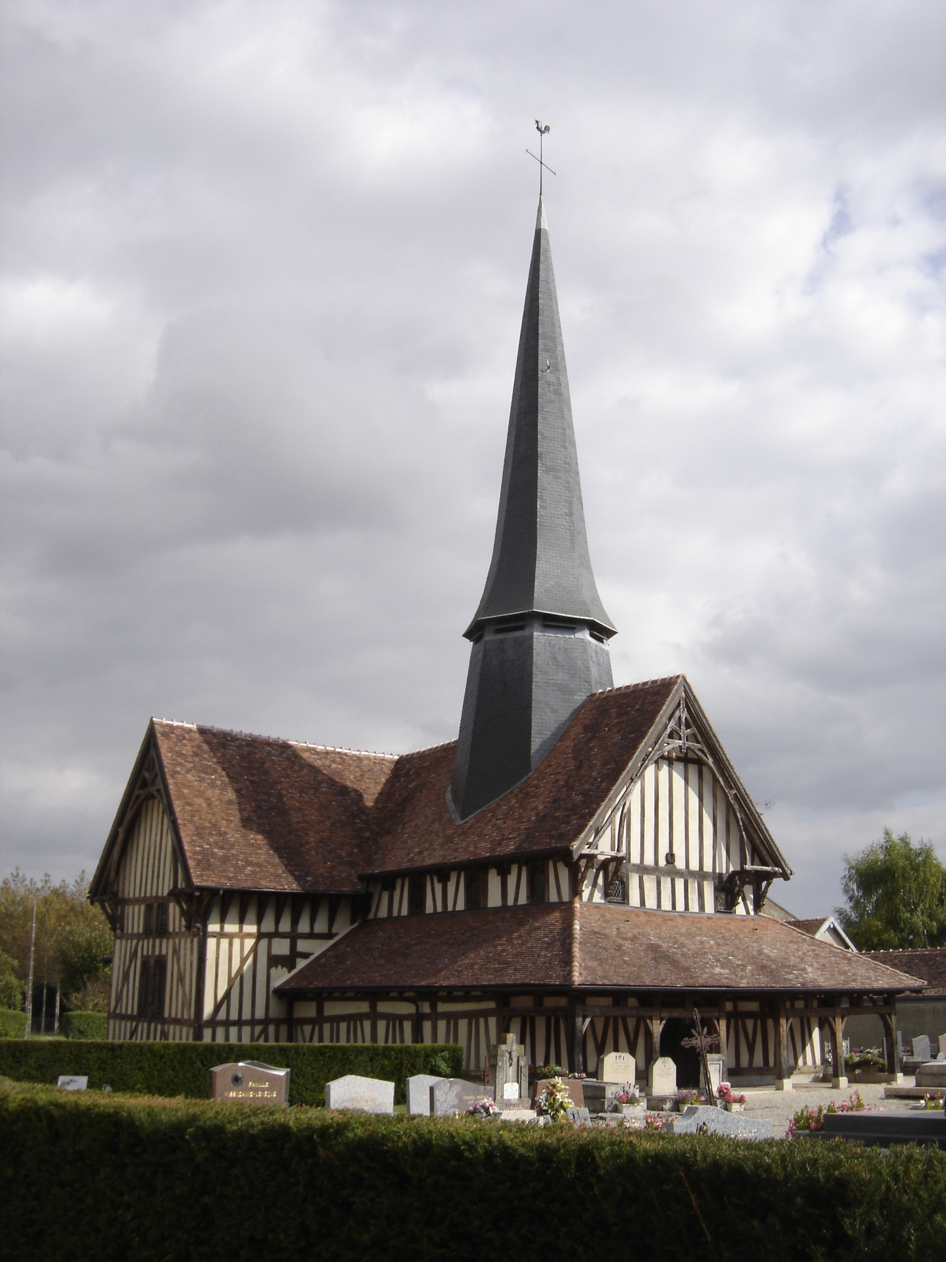 L'église à pans de bois de Longsols - Aube - France